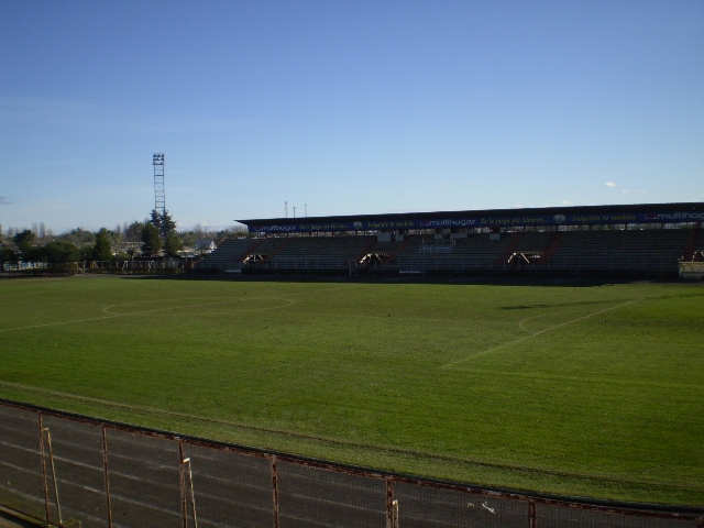 Estadio Municipal de Linares